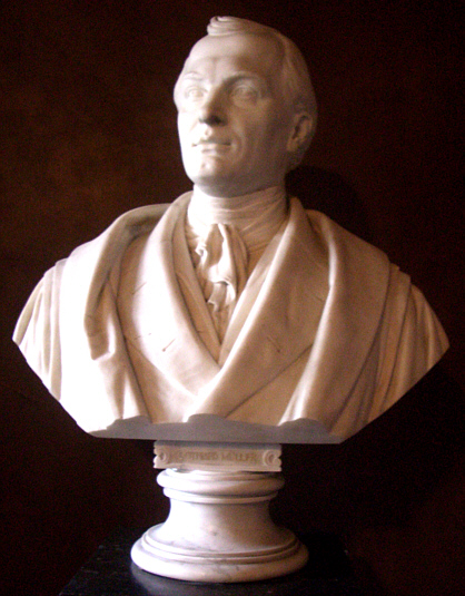 Karl Otfried Müller (1797–1840), deutscher Altertumswissenschaftler zu Göttingen. Marmorbüste, geschaffen vom Berliner Bildhauer Alexander Tondeur auf Anregung des ehemals Göttinger Professors für Klassische Philologie und Archäologie Ernst Curtius. Die Büste wurde 1880 als Pendant zu einer Statue Winckelmanns in der „Ruhmeshalle“ des Alten Museums aufgestellt, in der Zeit des Nationalsozialismus jedoch entfernt und in ein Depot ausgelagert. Das Göttinger Exemplar ist eine Wiederholung desselben Werkes, die 1900 im Historischen Saal der Universitätsbibliothek aufgestellt wurde und sich heute im Vestibül des Aulagebäudes am Wilhelmsplatz befindet. Abgüsse befinden sich u. A. im Seminar für Klassische Philologie und im Institut für Archäologie der Universität Göttingen.